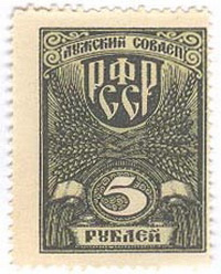 Фискальная марка Лужского Совдепа, 5 рублей